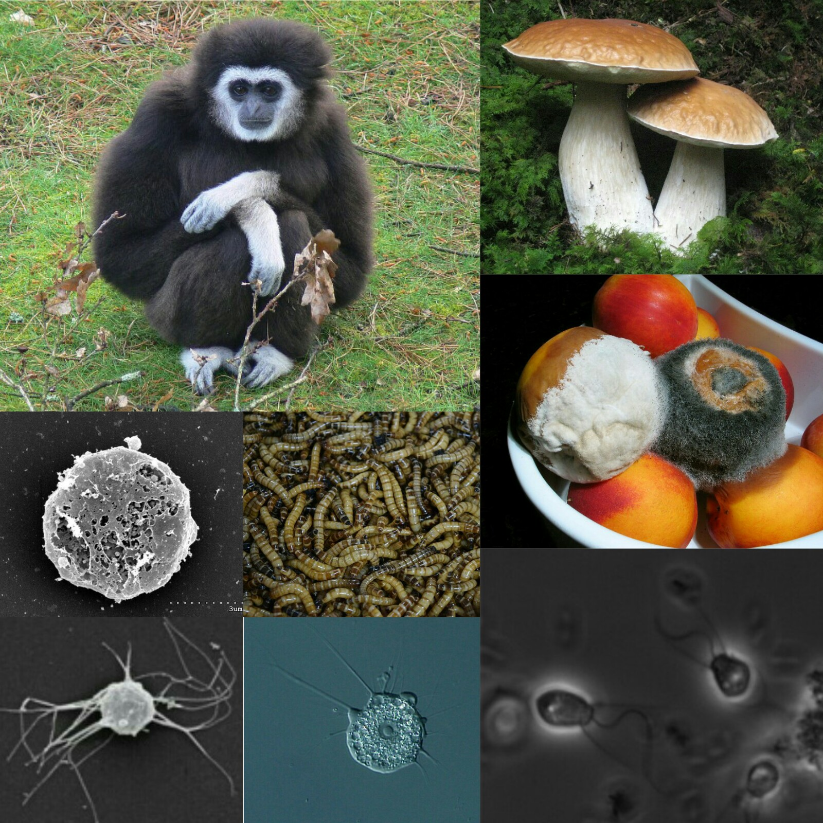 Collage de opistocontos.